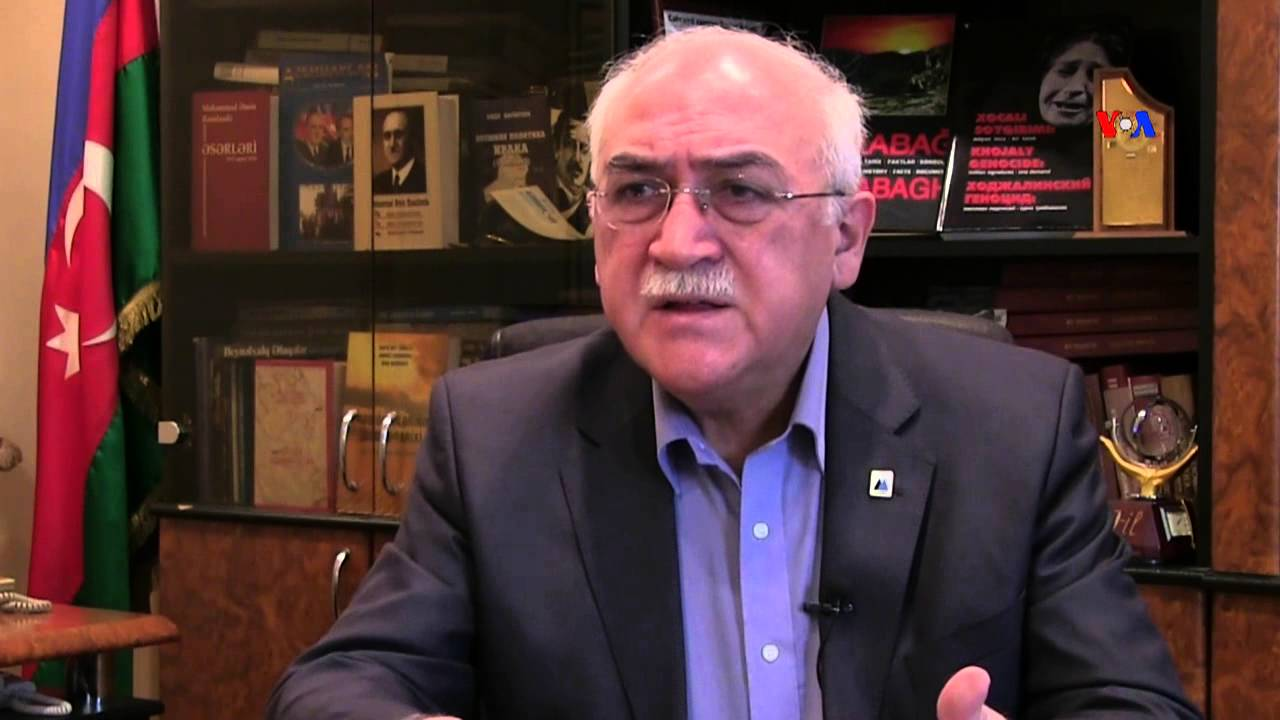 İsa Qəmbər 2016-cı ildə